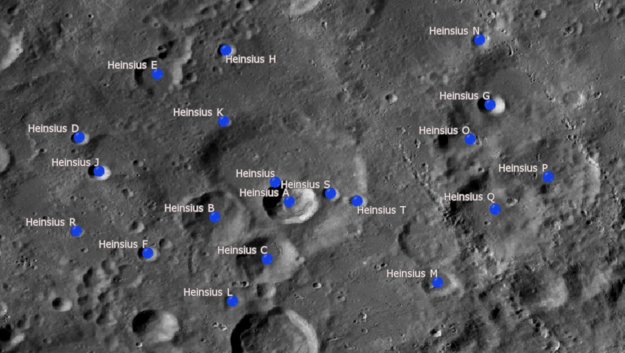 Cráter lunar Heinsius. Cráteres satélite. (Imagen LRO)